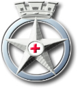 Fregio corpo sanitario (non laureati), esercito italiano